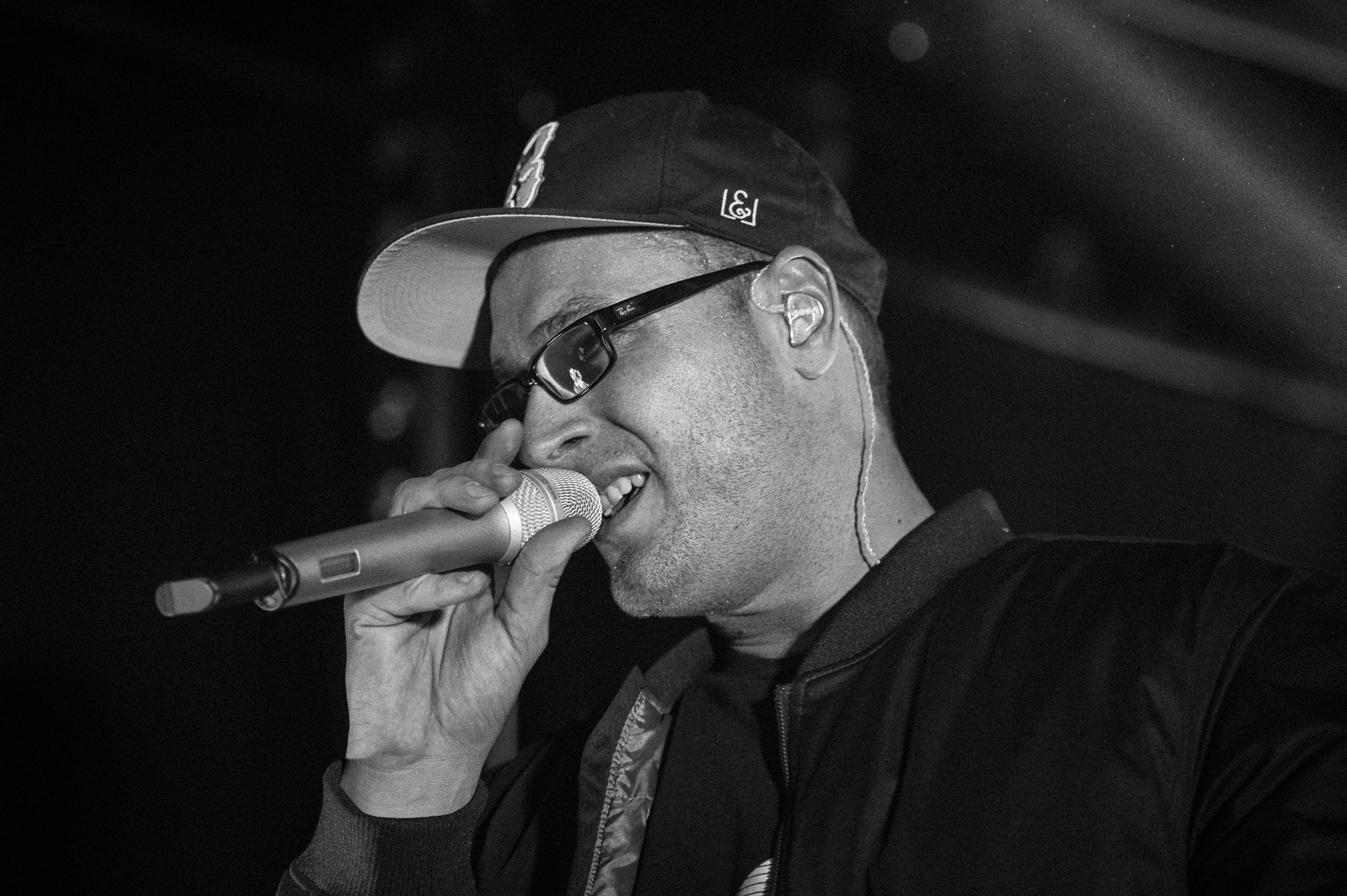 Concertbüro Franken,Der Hirsch,Jochen Burchard,JokA,Konzert,Livekonzert,Livemusik,Musik